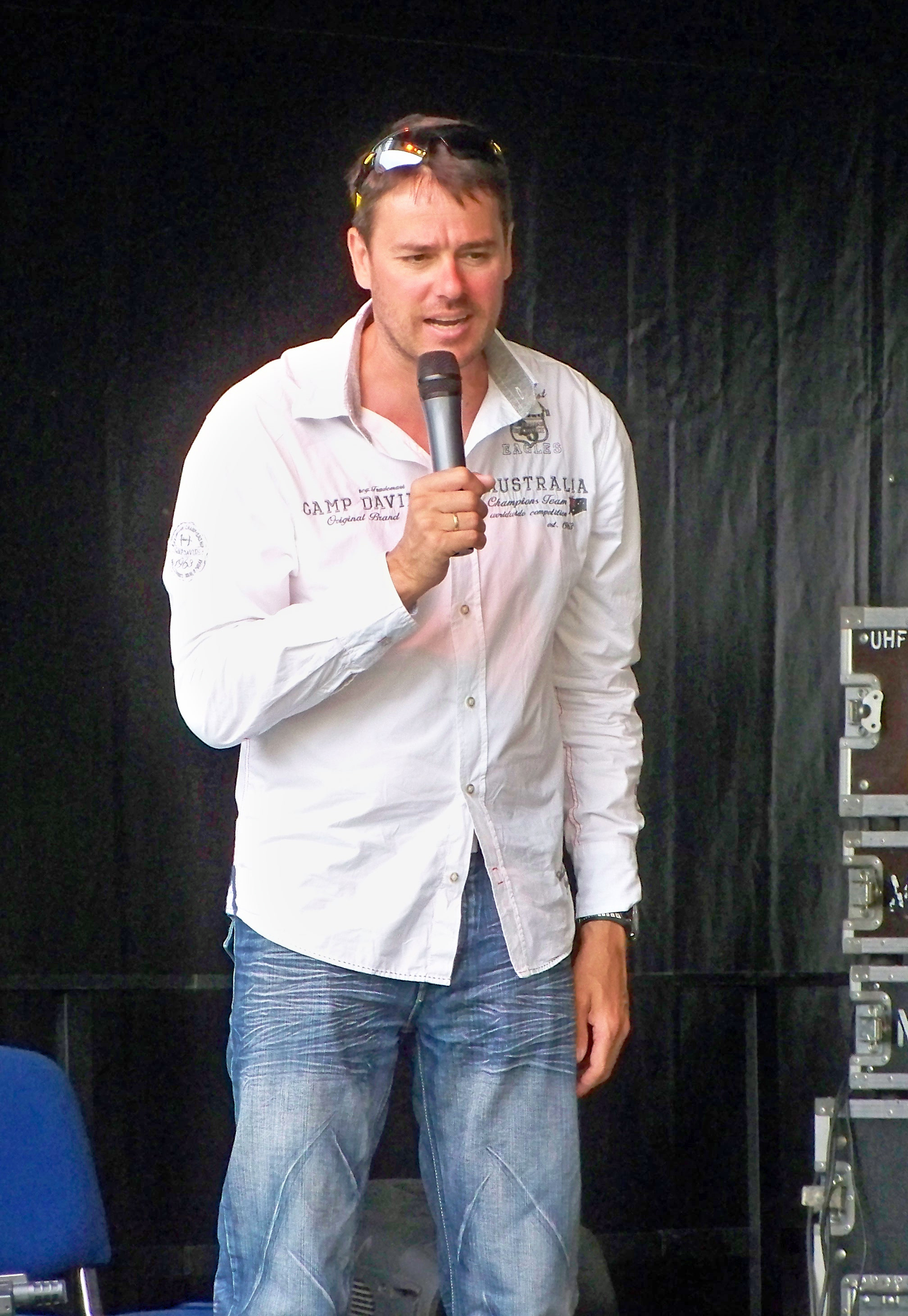 Moderator Roman Knoblauch während der Guinnessrekordversuche des Kraft & Fitness e.V. Eilenburg, durchgeführt vom amtierenden deutschen Meister im Kraftdreikampf, Marcel Mette, und dem amtierenden deutschen Vizemeister im Kreuzheben, Matthias Müller.